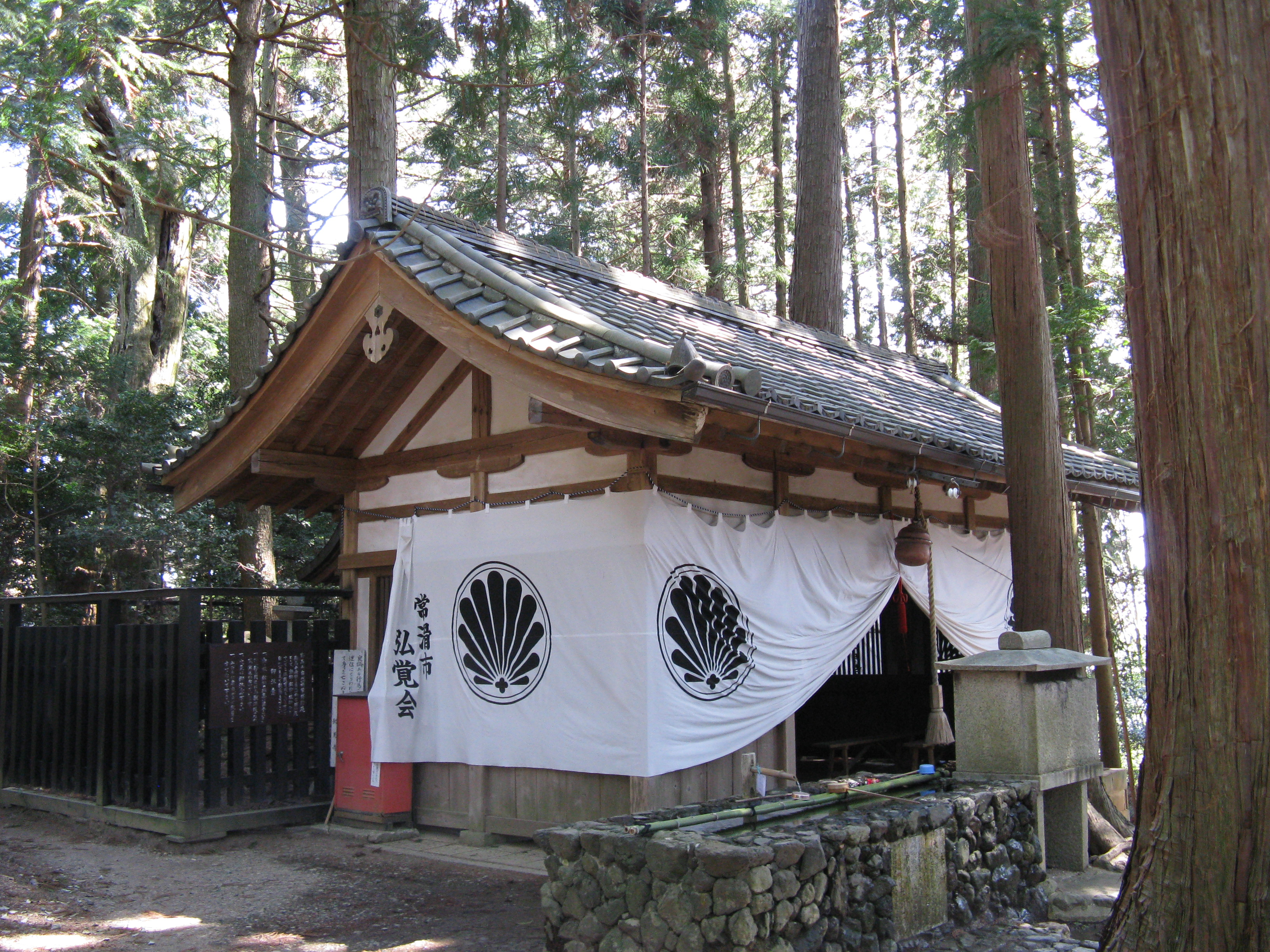 鞍馬寺 大杉権現社